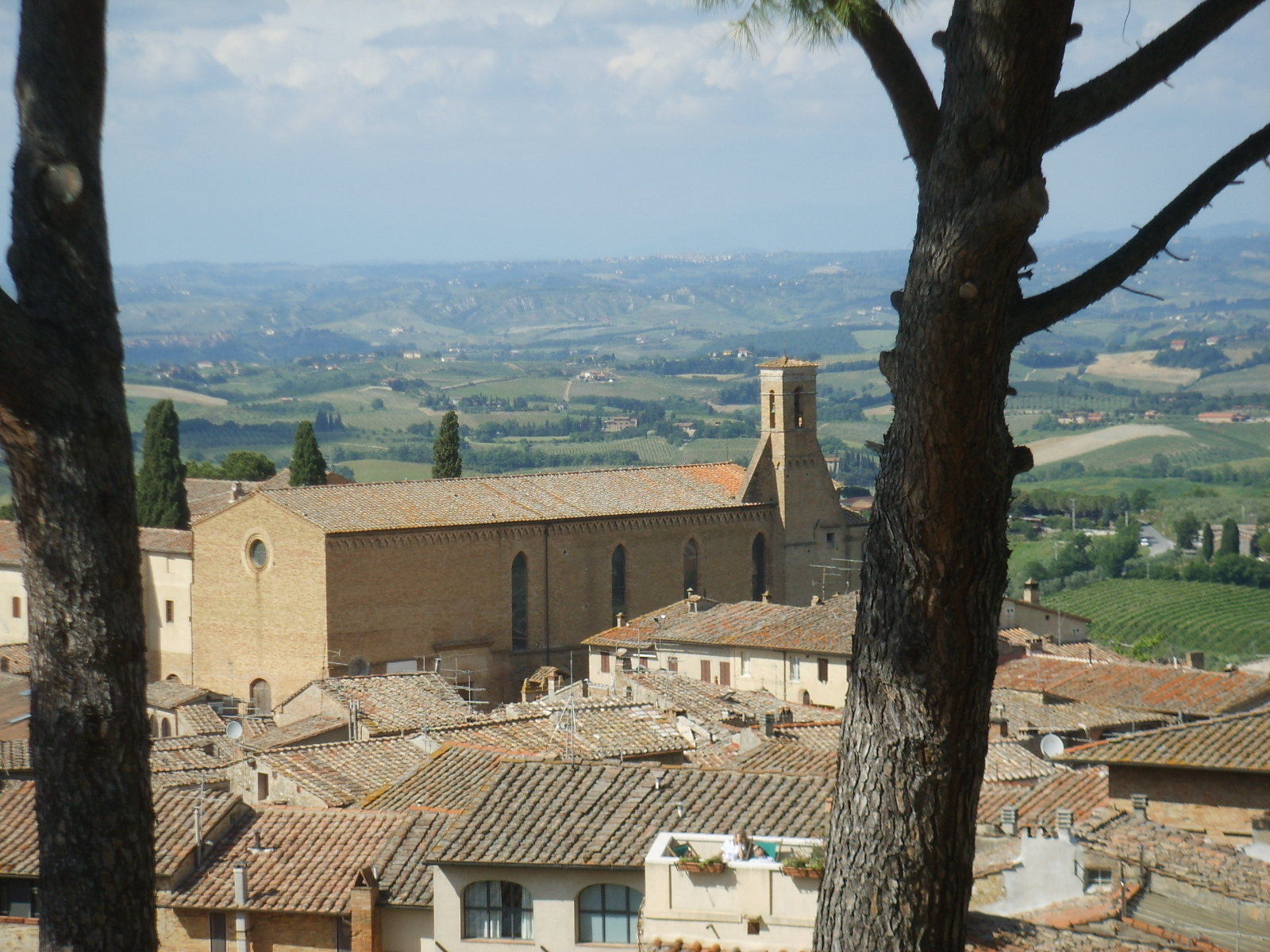 San gimignano chiesa di sant'agostino